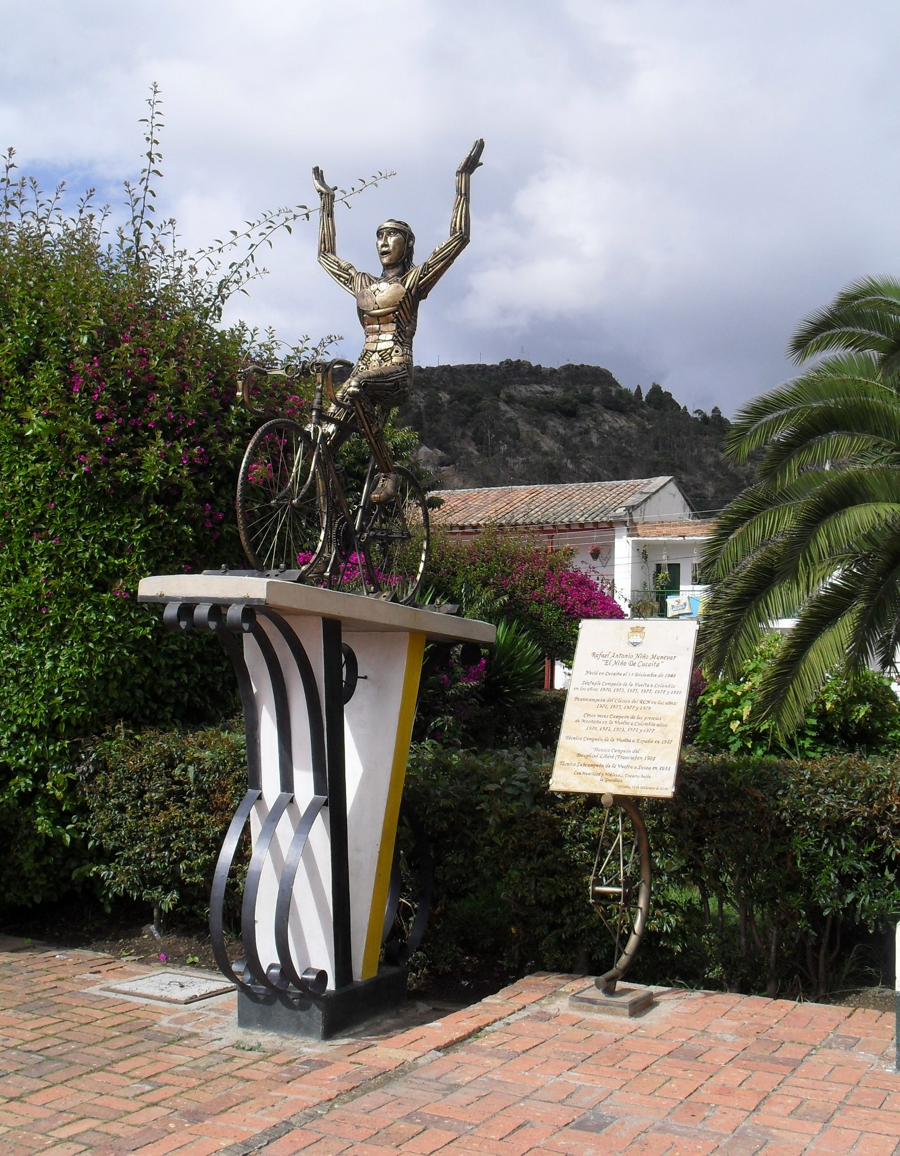 Estatua de Rafael Antonio Niño en el parque principal de Cucaita, Boyacá, Colombia